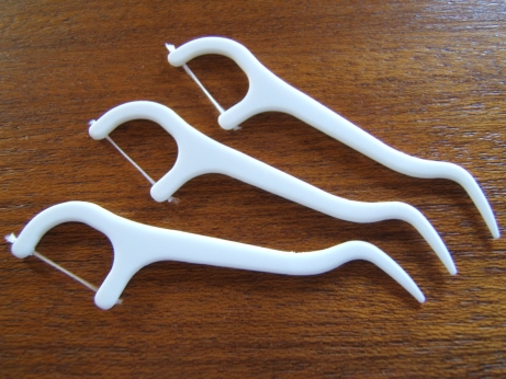 Combinatie-tandenstokers met tandzijde. Tandenstoker met tandzijde.